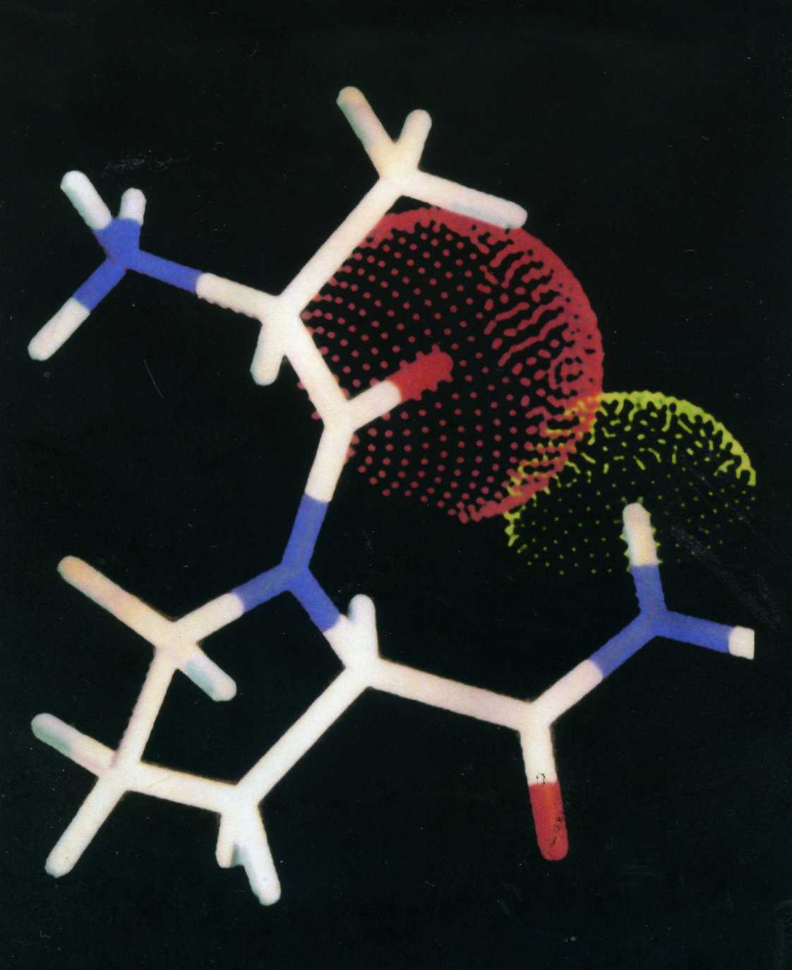 Erkennungsstruktur der Dipeptidylpeptidase-4-Substrate